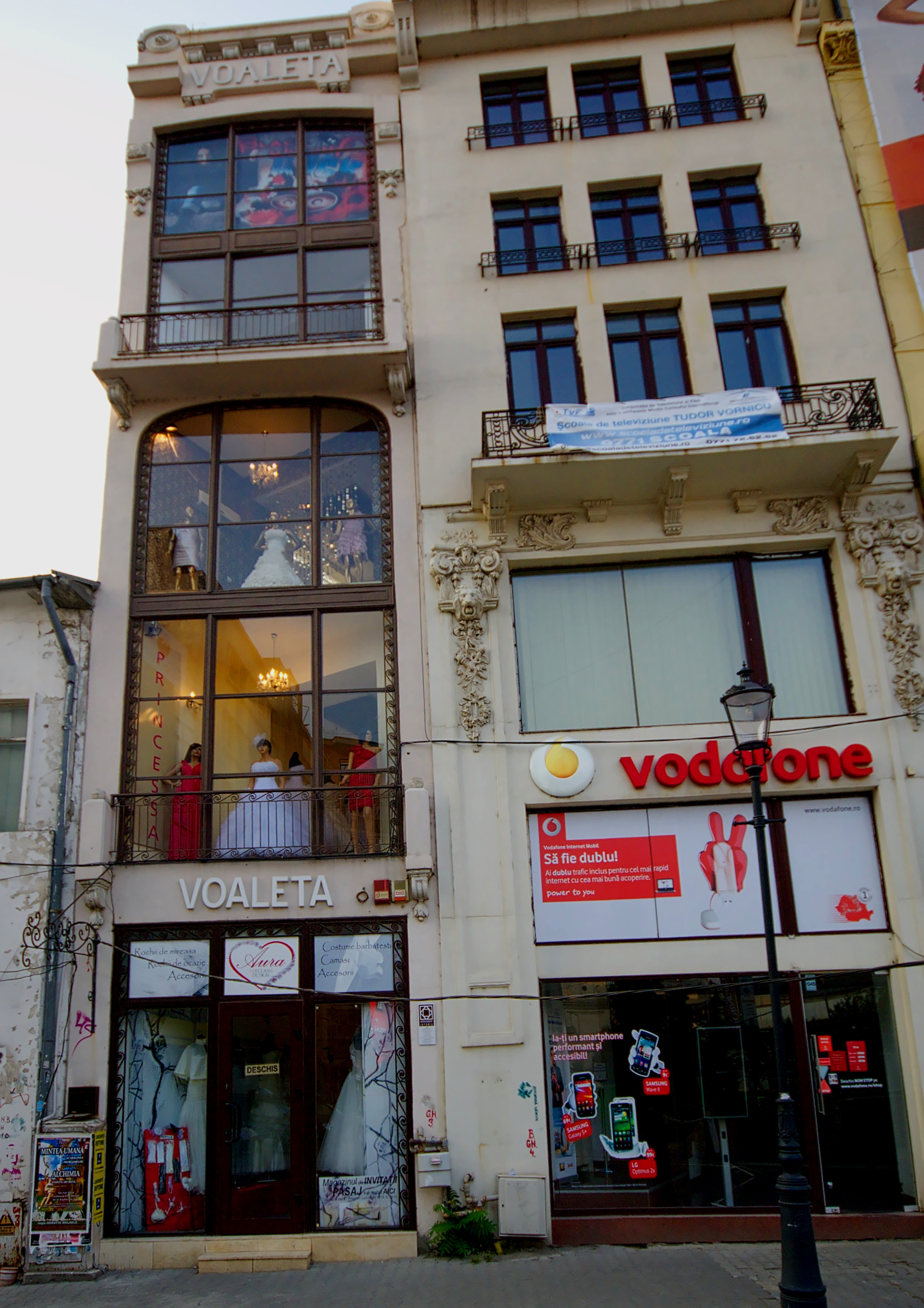 Magazinul "Voaleta", Lipscani 77